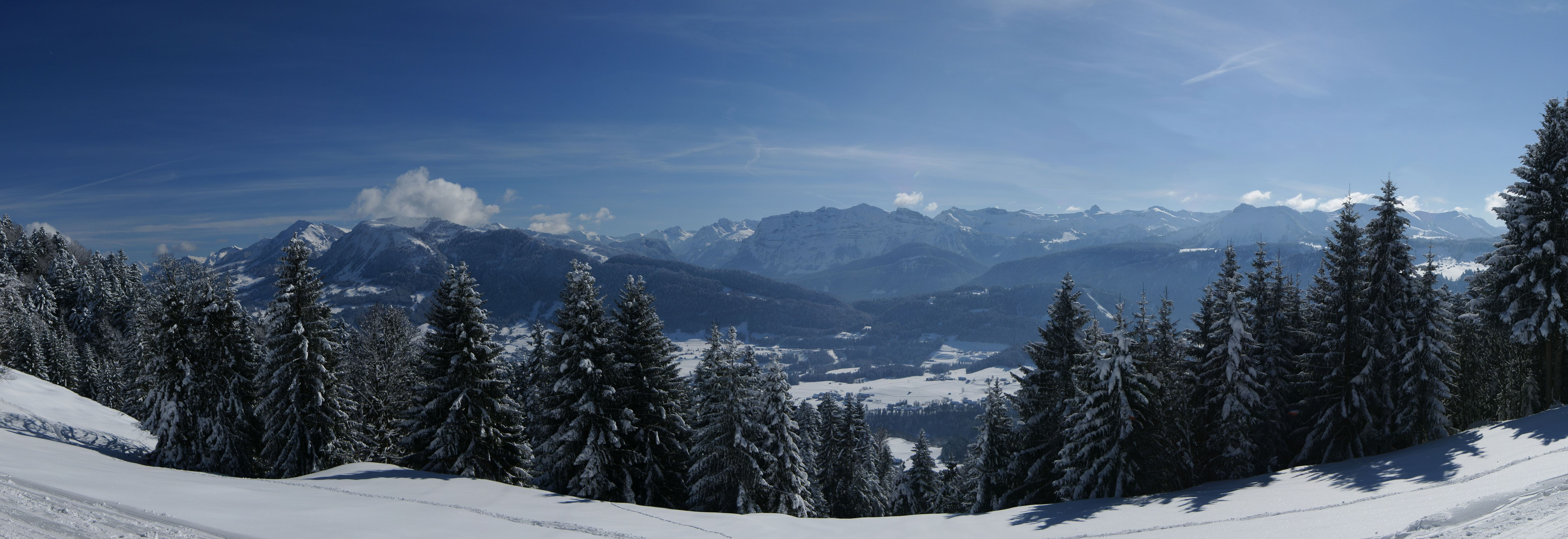 9 Bild-Panoramablick unter dem Brüggelekopf in Alberschwende auf Höhe Lorenpaß: Im Tal Ortsteile von Bersbuch und Schwarzenberg. Das Gebirge links beginnend: Berge der Allgäuer Alpen, des Lechquellengebirges und des Bregenzerwaldgebirges. Im einzelnen v.l.n.r.: die Winterstaude 1877m, Tristenkopf 1.741m, Vordere Niedere 1.586m, Baumgartenalpe 1624m, Diedamskopf 2090m, Üntschenspitze 2135m, Juppenspitze 2412m, Mohnenfluh 2542m, Hochkünzelspitze 2397m, Niedere Künzelspitze 2156m, Kanisfluh 2044m, Klipperen 2066m, Damülser Mittagsspitze 2095m, Hohes Licht (Damüls) 2009m, Hochblanken 2068m, Ragazer Blanken 2051m, Sünser Spitze 2061m, die Mellauer Hangspitze 1746m, das Dornbirner Firstgebirge mit dem Leuenkopf und der Mörzelspitze 1827m.